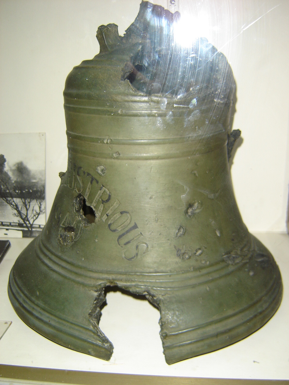 Schiffsglocke der HMS Illustrious nach den Luftangriffen auf den Träger.